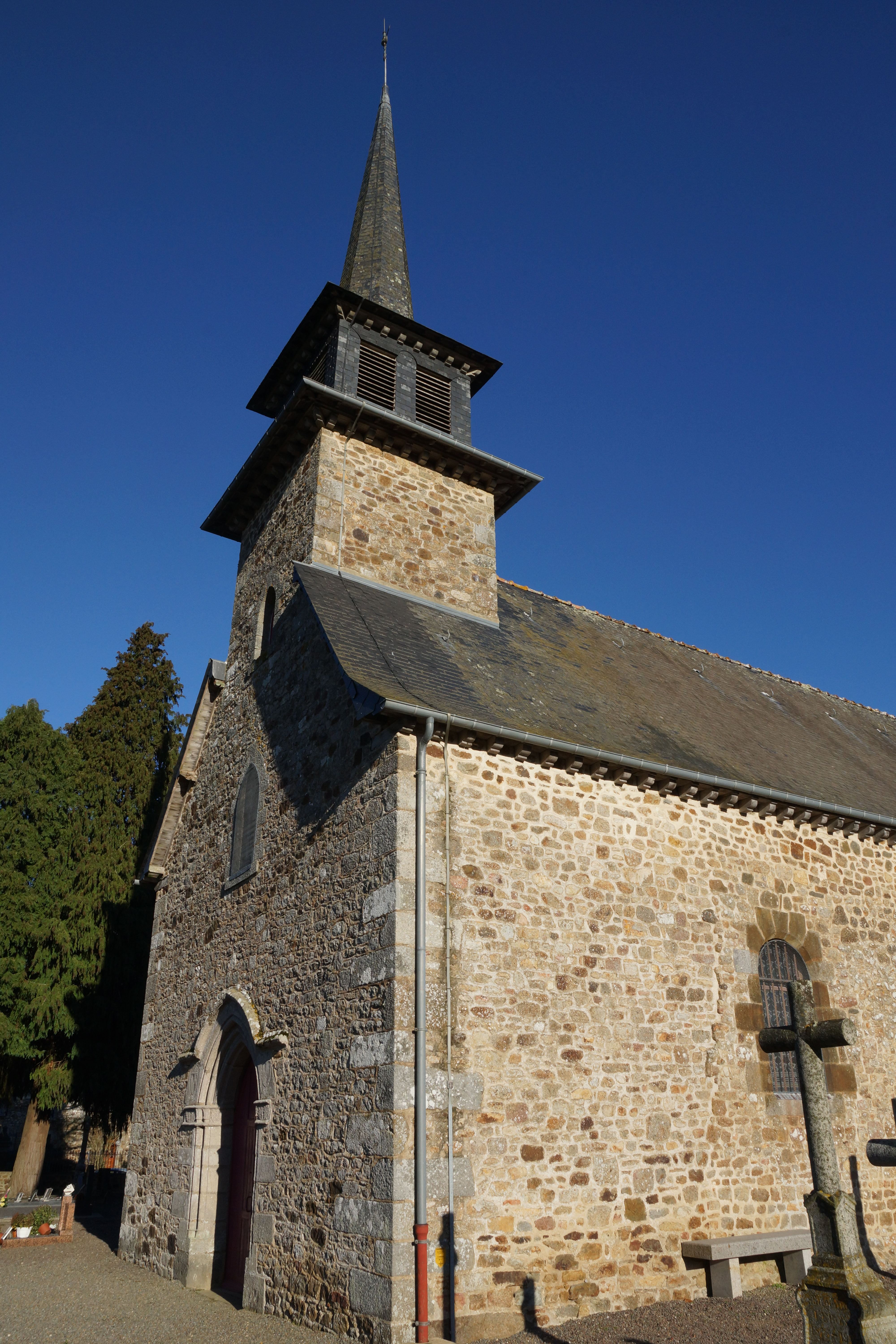 détail de l'église de Saint-Gondran, Ille-et-Vilaine, photo prise en décembre 2014